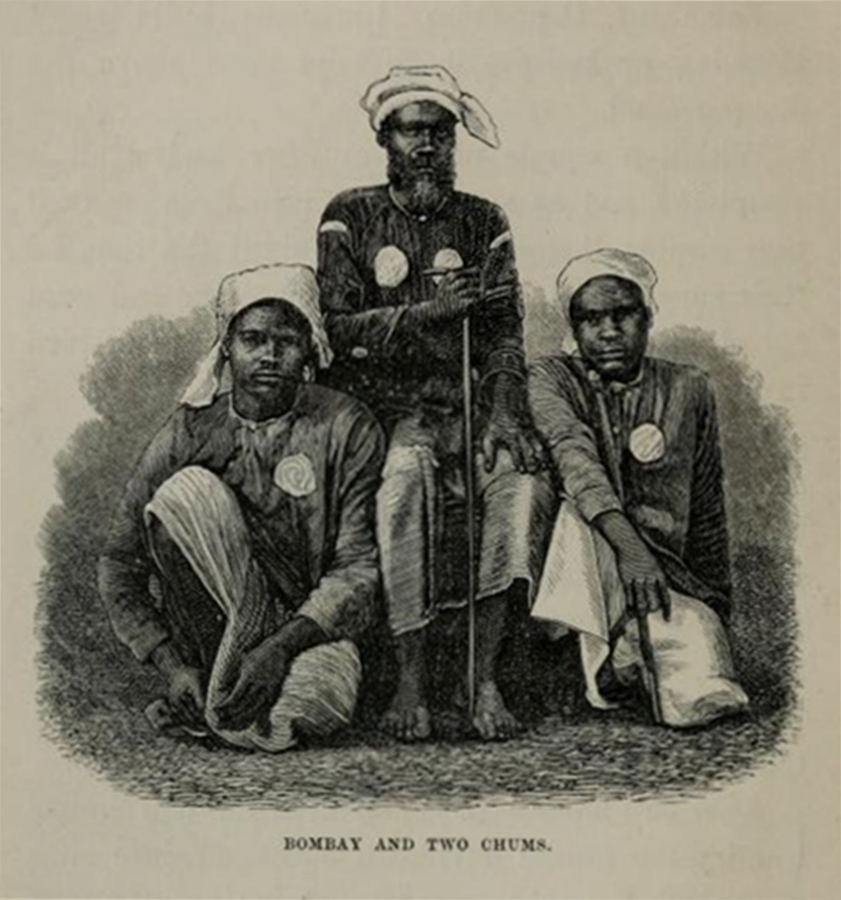 Ilustración de Sidi Mubarak Bombay flanqueado por dos compañeros en Acros Africa.